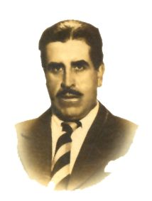 Luis Leopoldo Franco (1898-1988), poeta y ensayista argentino.